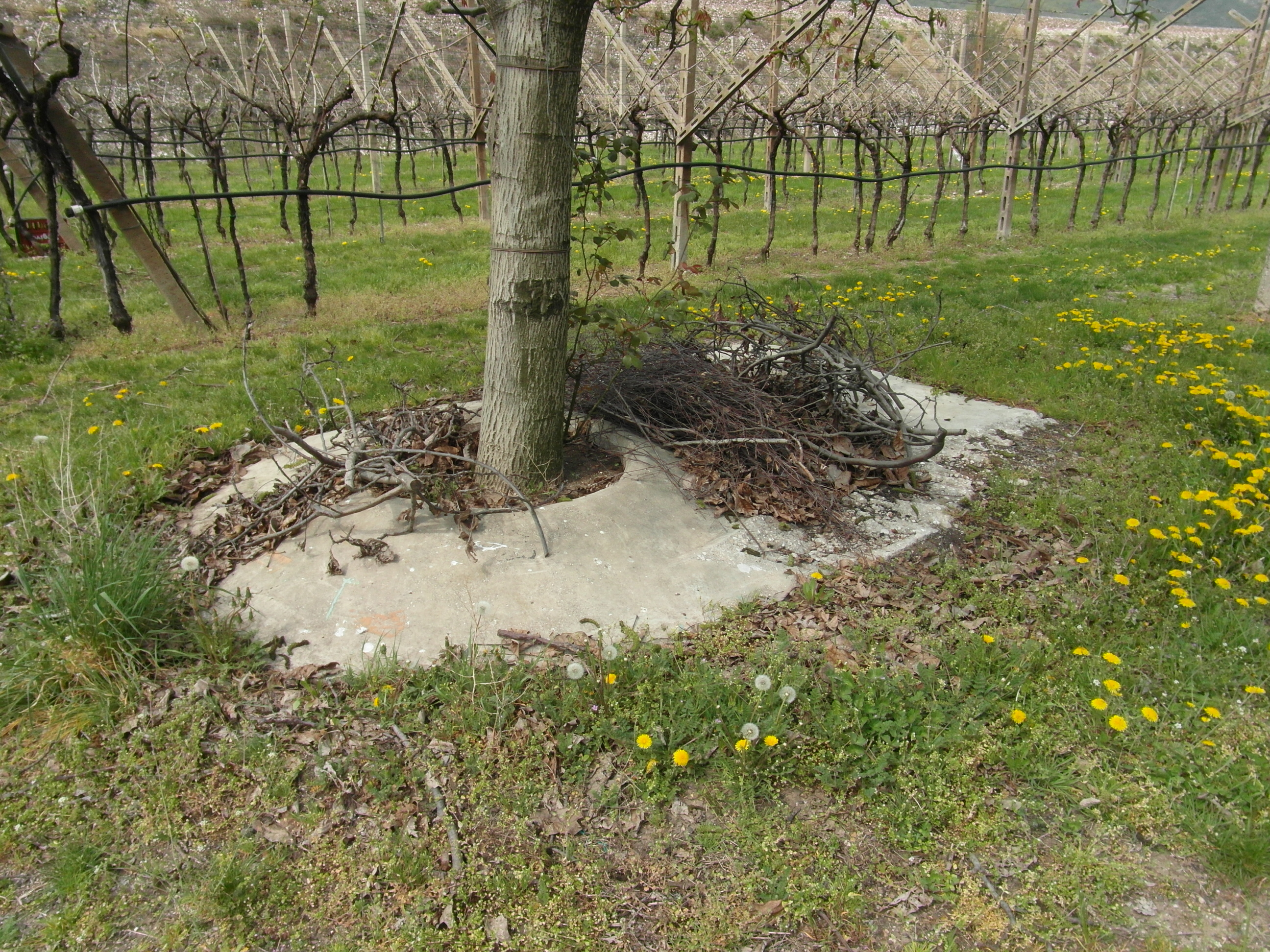 Sbarramento Ala nord